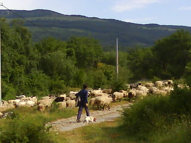 Stado porodice Štrbac iz Vođenice